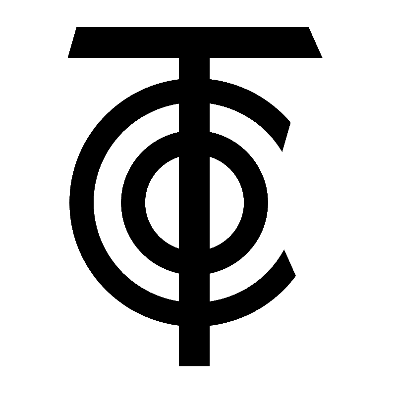 Logo der Blechspielwarenfabrik „Tippco“